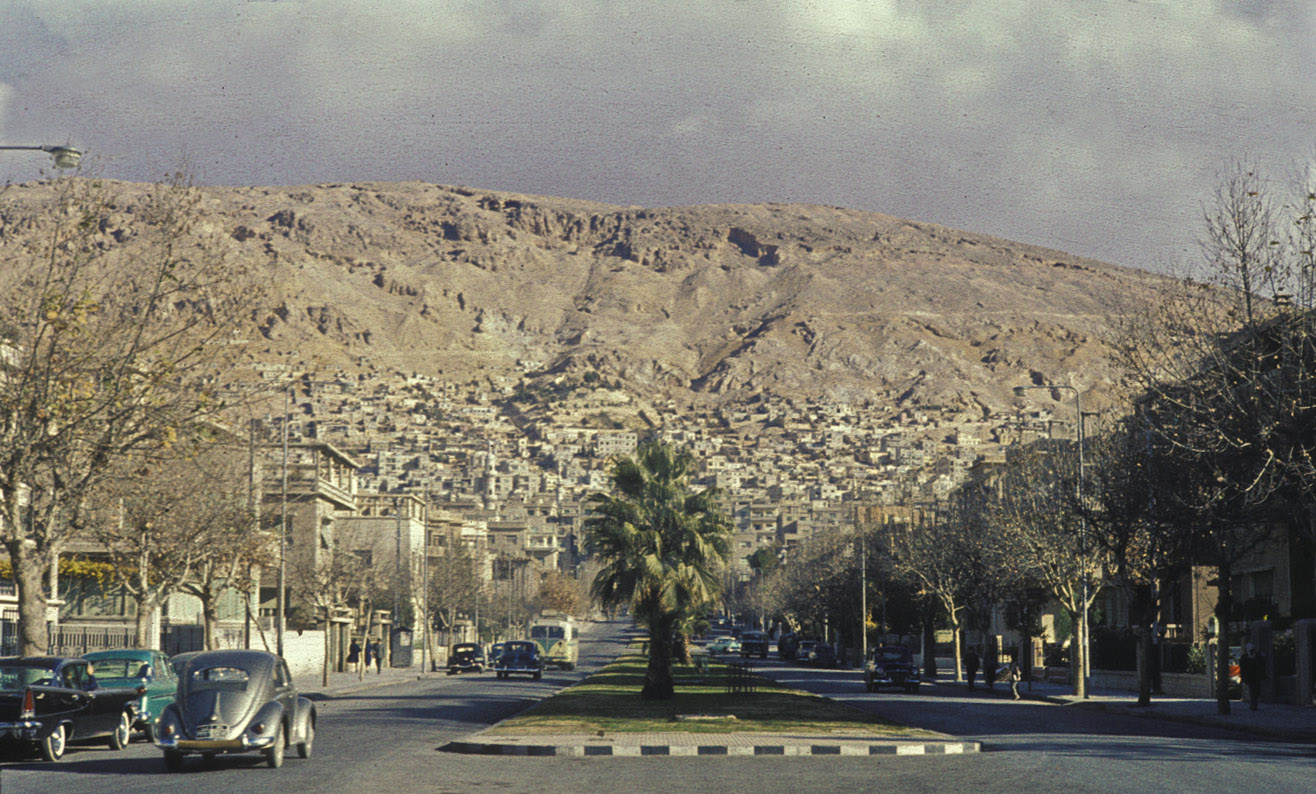 Damascus